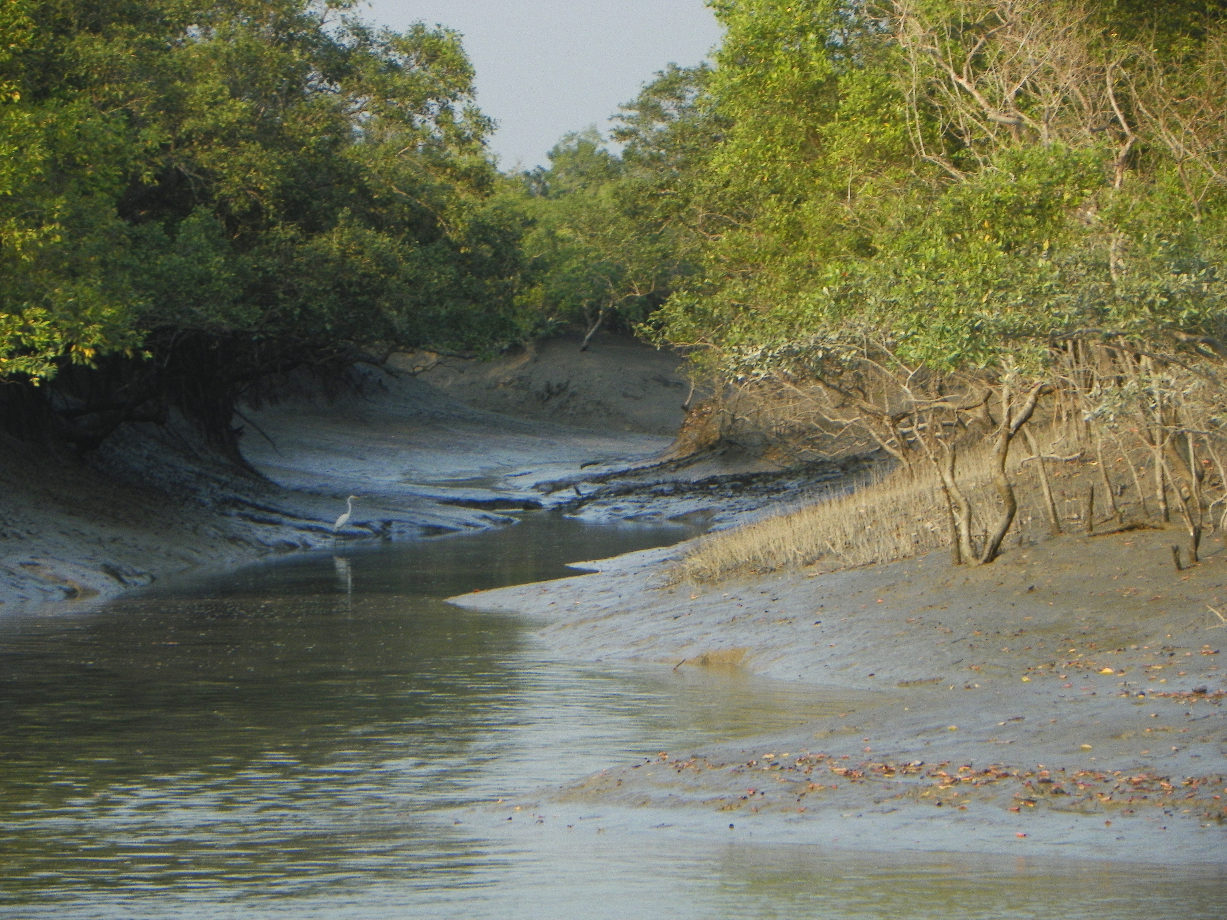 Sndarbans National Park, boat trip